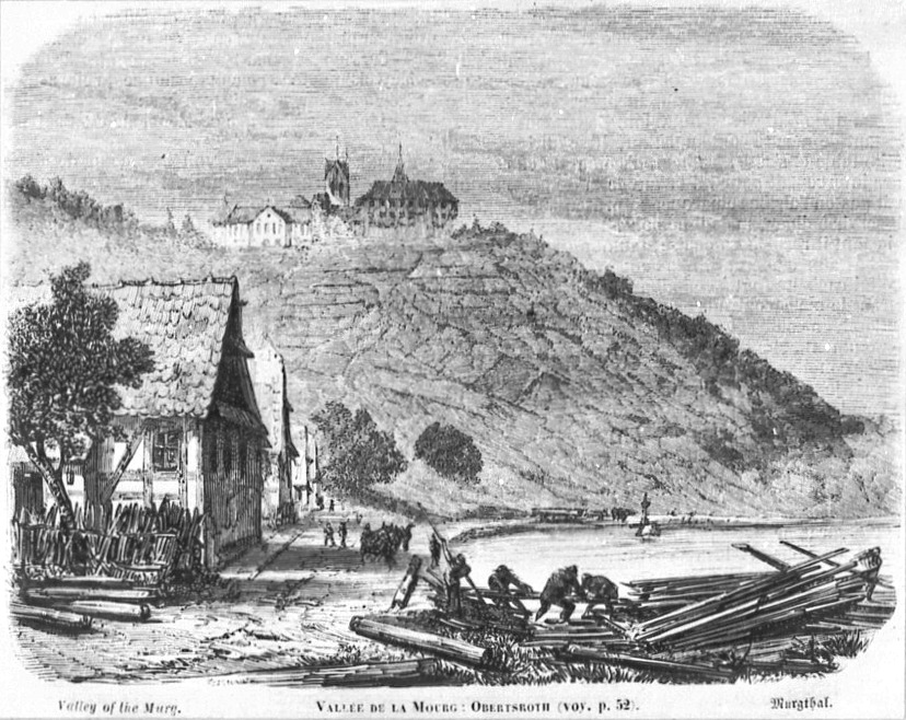 Murgtal um 1858. Blick von Obertsrot auf Schloss Eberstein,Stich